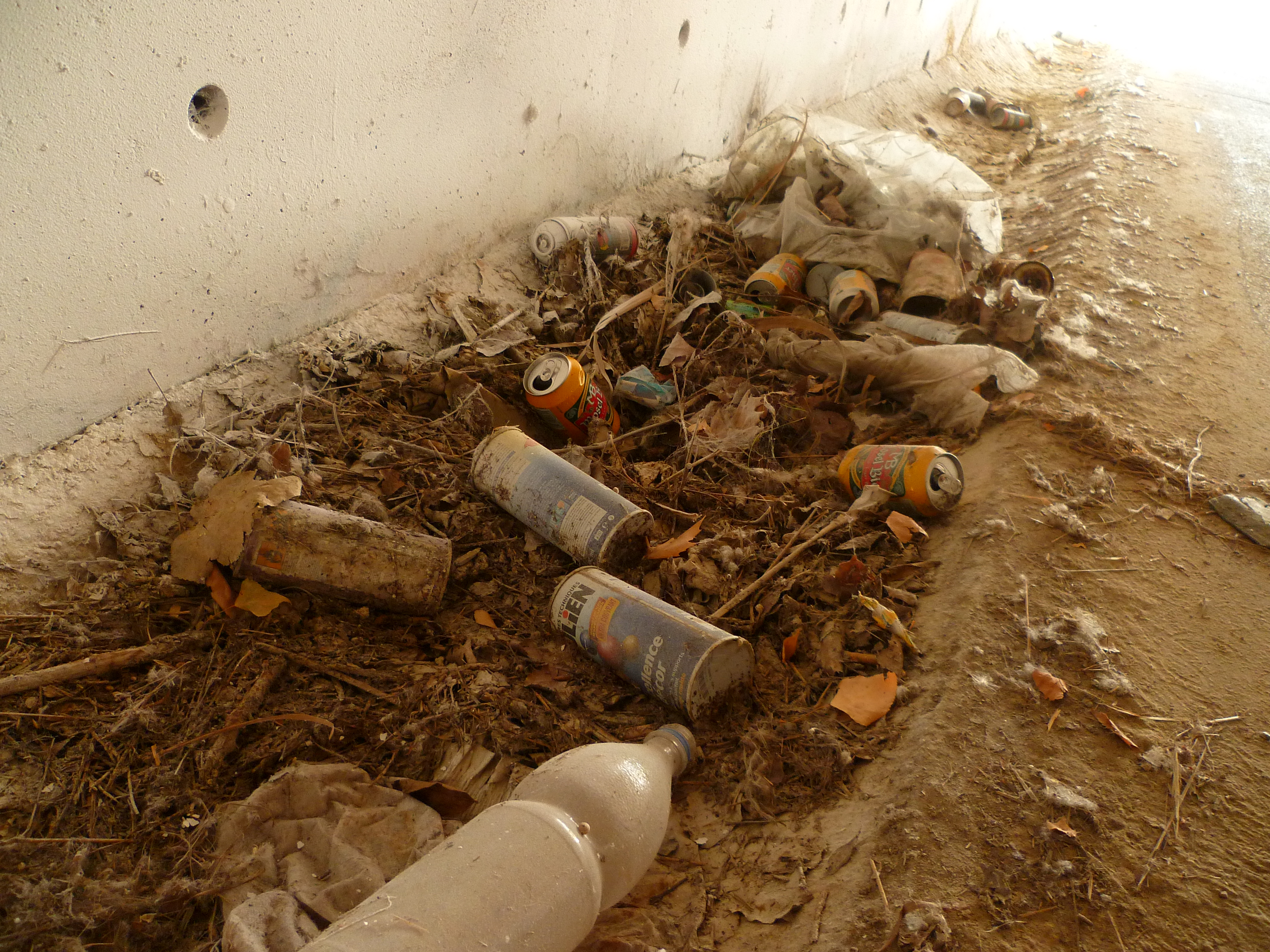 Canettes et bombes de peintures abandonnées par les graffeurs et mur aspergé de peinture blanche pour masquer les graffitis. Quartier de Lespinet à Toulouse (France).